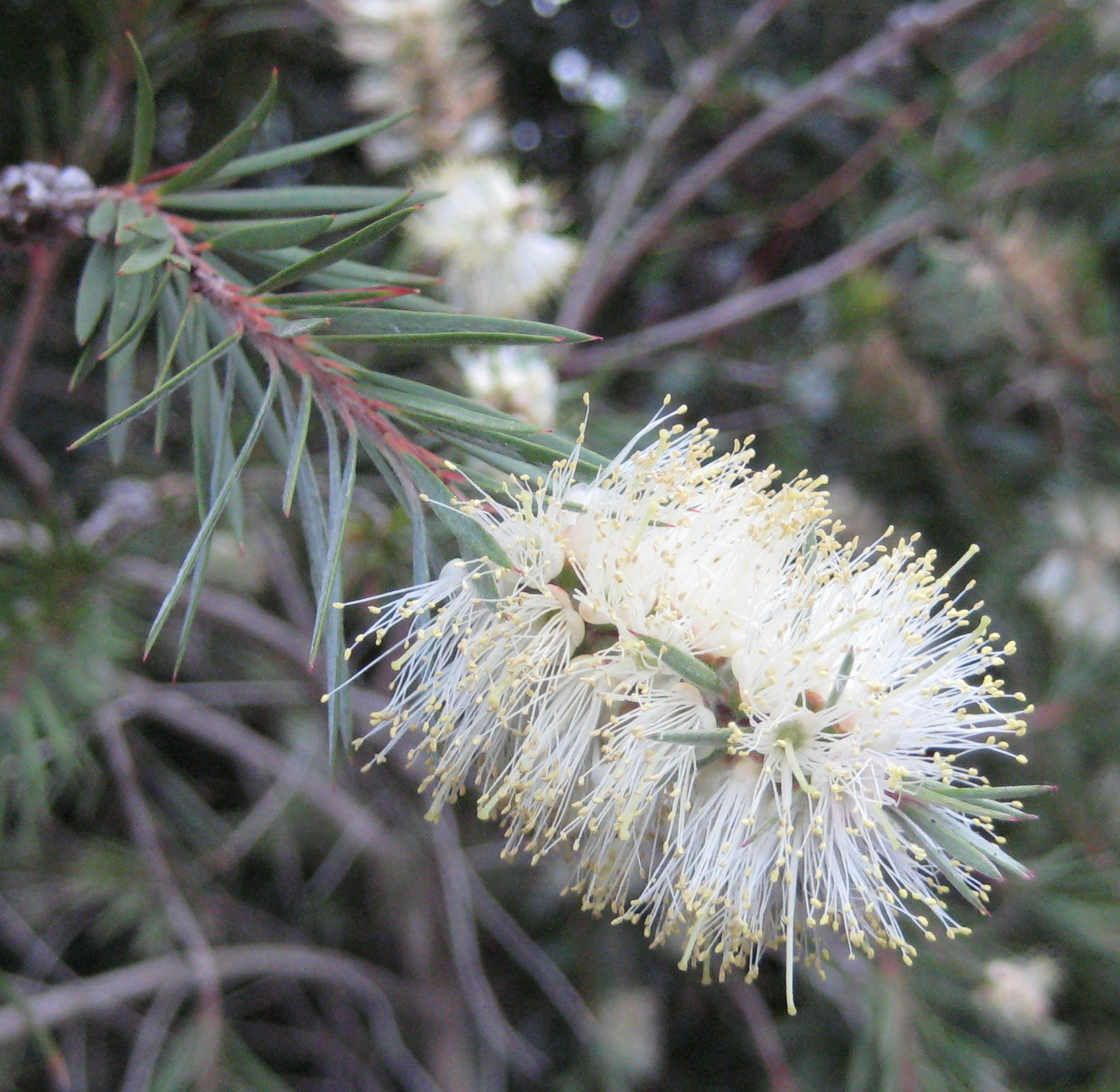 Callistemon salignus im Botanischen Garten Dresden